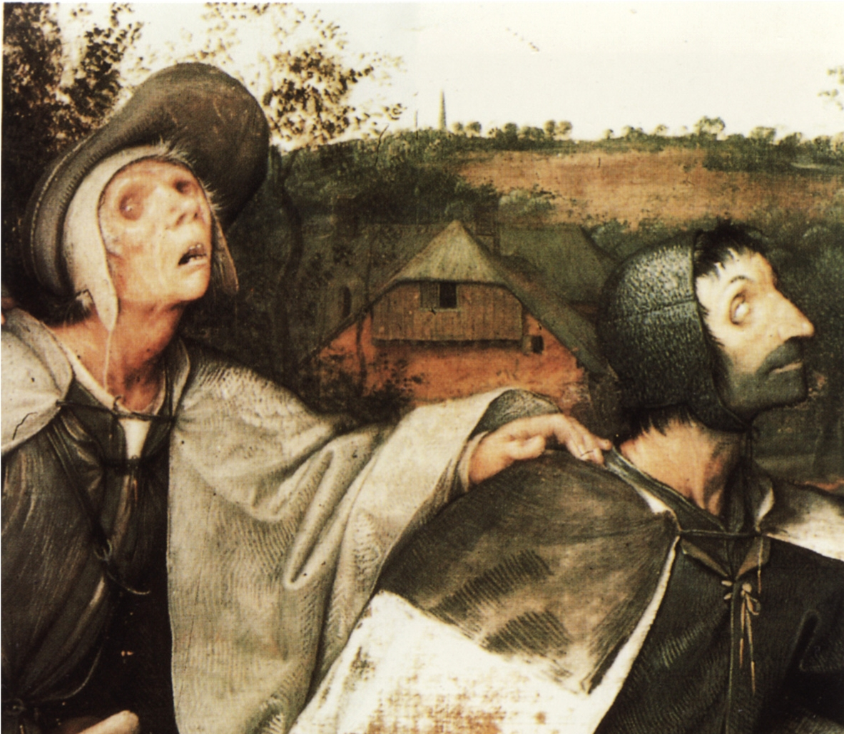 Ausschnitt aus Bruegels Gemälde Der Blindensturz